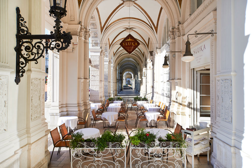 Terrasse und Arkaden Conditorei Sluka Rathausplatz